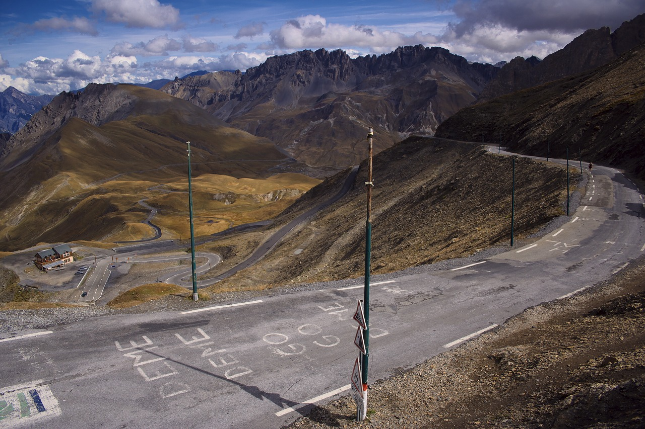 19 sep. 2009 La Grave - Col du Lautaret - Col du Galibier - Col du Telegraphe - Modane